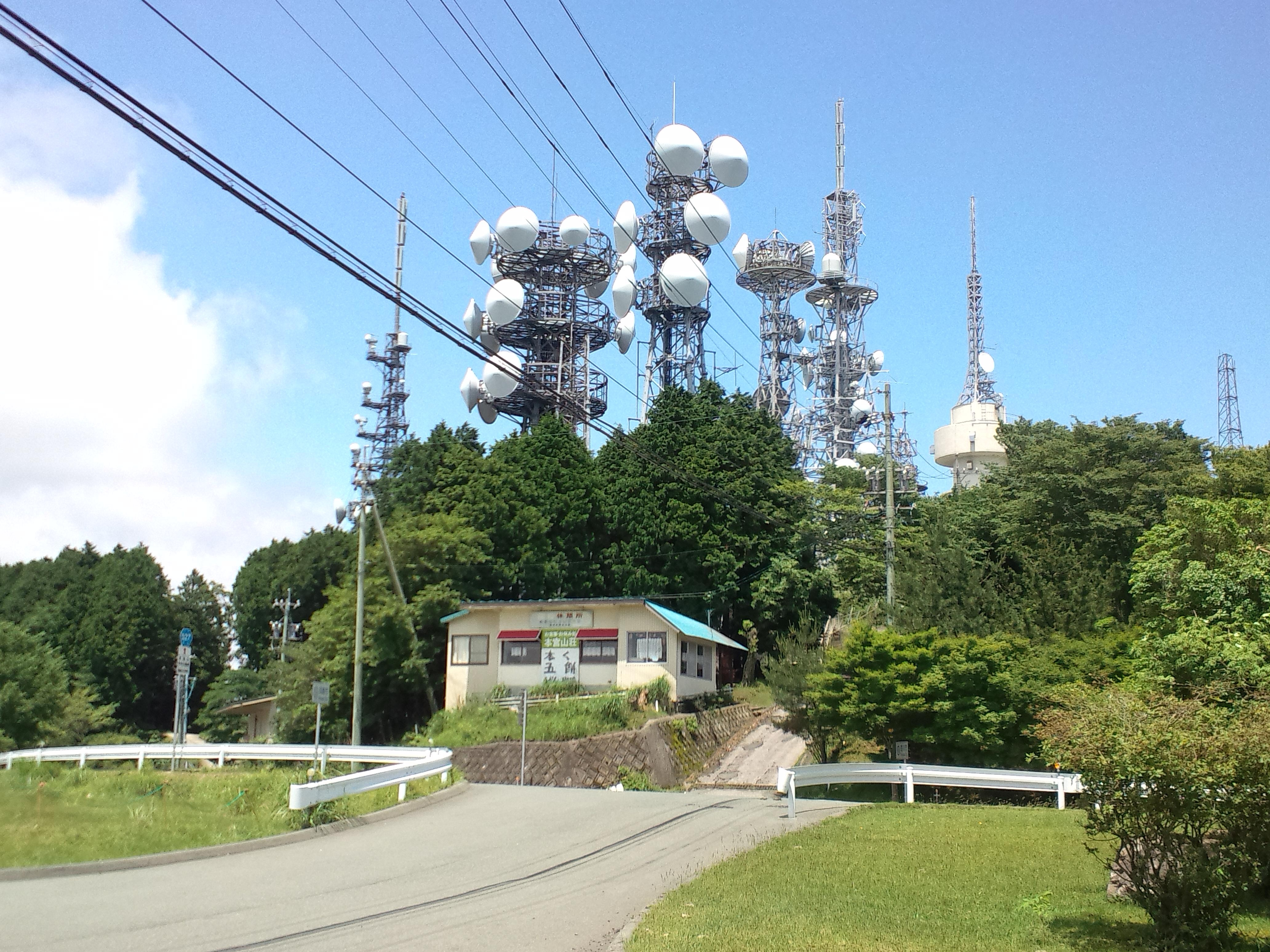 本宮山頂上のアンテナ群